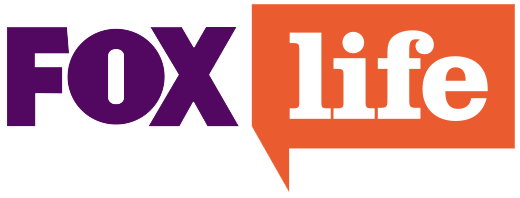 Foxlife